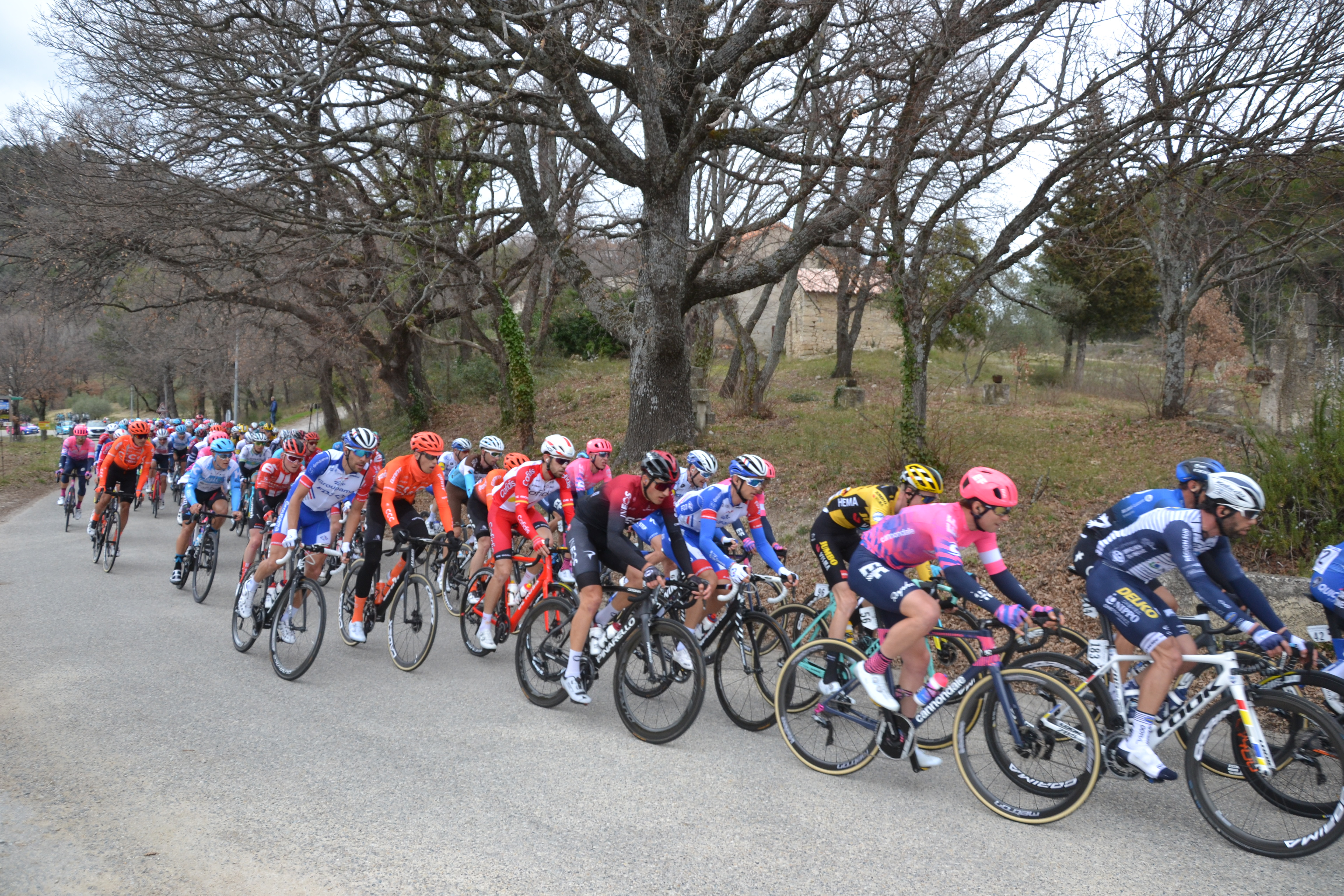 durant la ème étape du Tour de la Provence